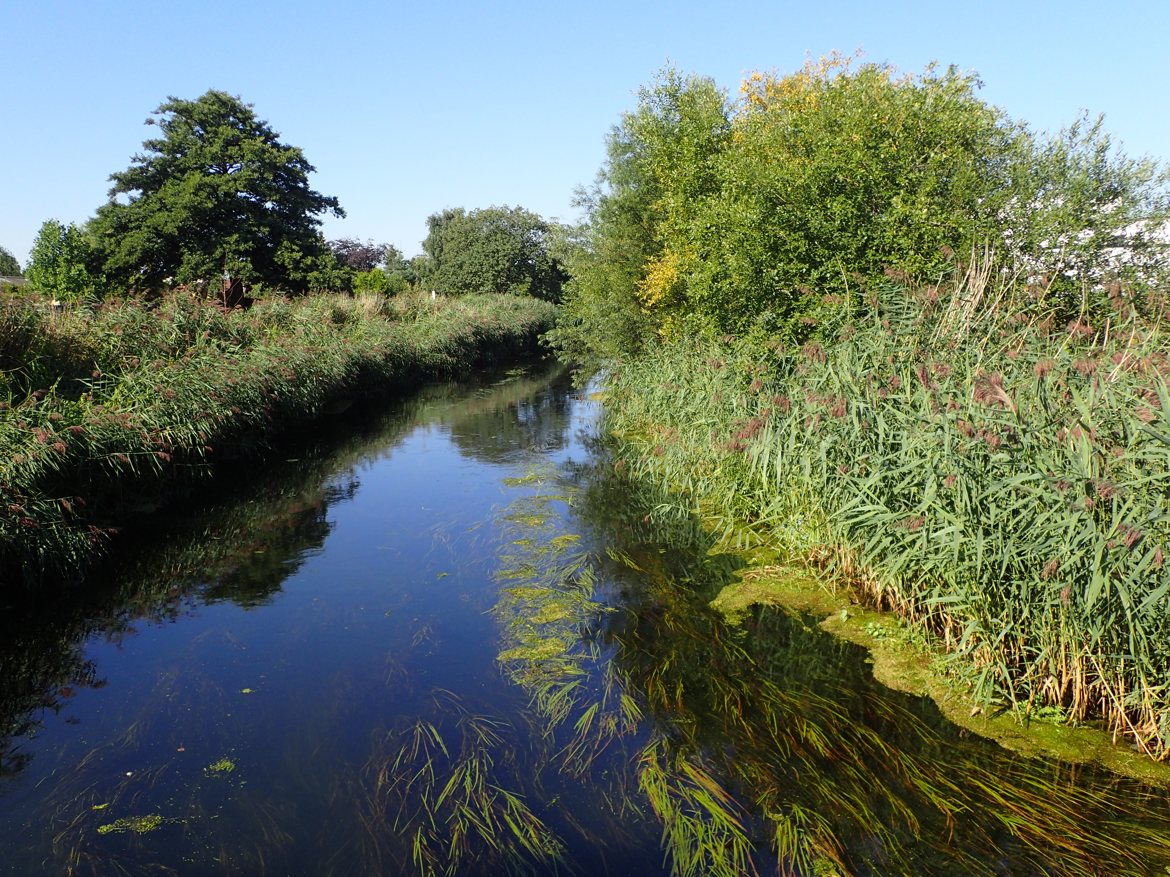 Grenåen ved Åholmen.